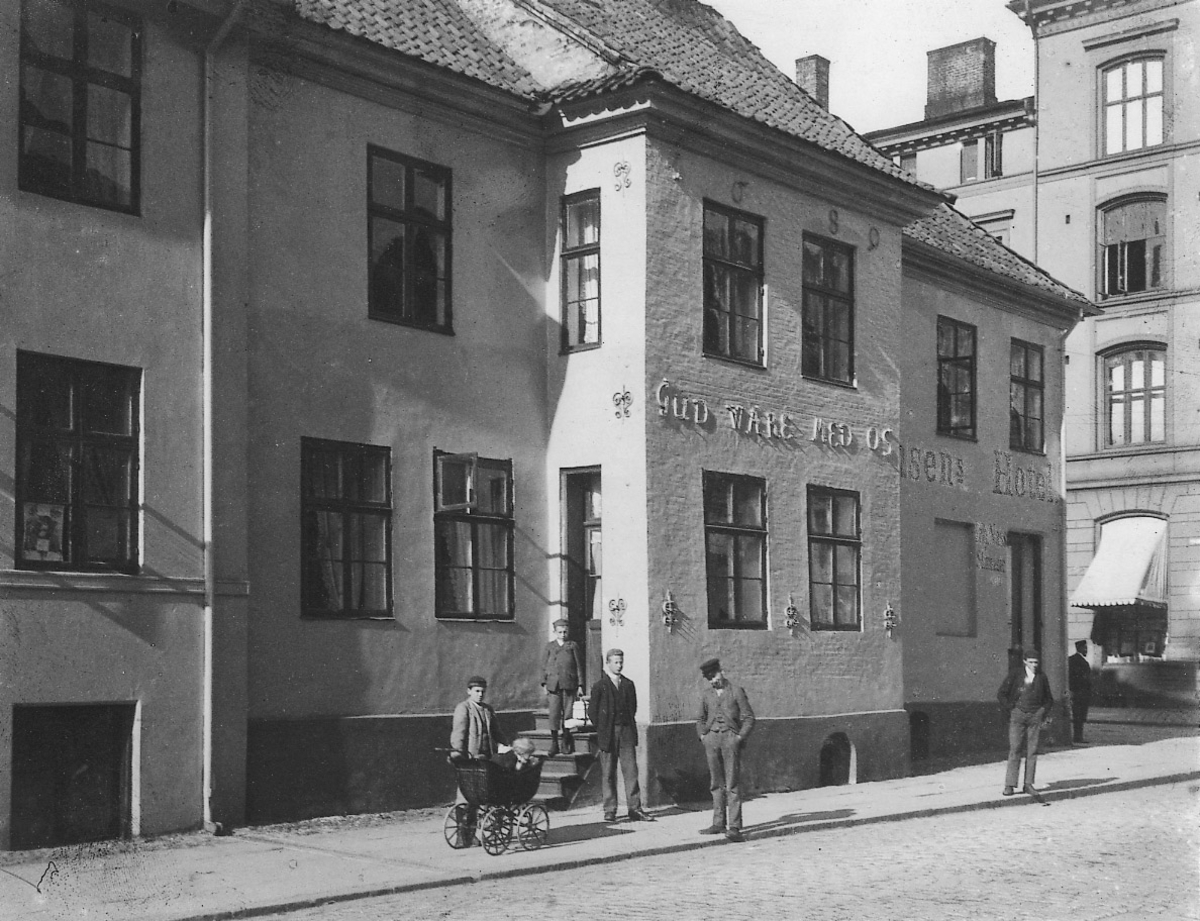 Den opprinnelige "Gud wære med os"-gården fra 1689, som sto i Tollbugata 30 til 1898.